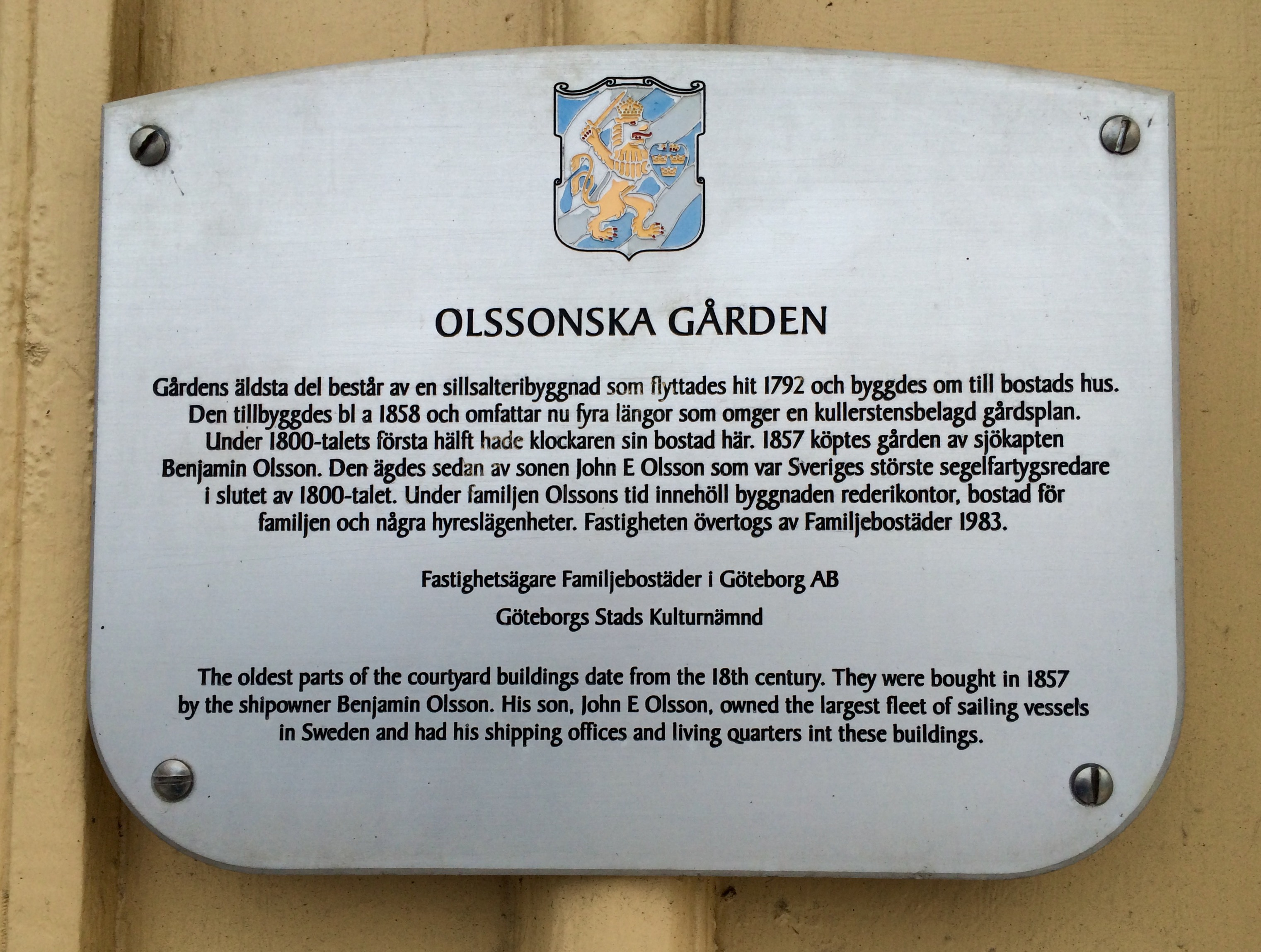 Minnesplakett vid Olsonska gården i Göteborg. Plaketten sattes upp som en del av Göteborgs stads kulturnämnds "Projekt Husmärkning" kring åren 2000-2001 där drygt hundra skyltar ingick. Se även boken "100 utmärkta hus i Göteborg". Vid en inventering av kommunen gjord 2016 satt 69 skyltar fortfarande uppe.